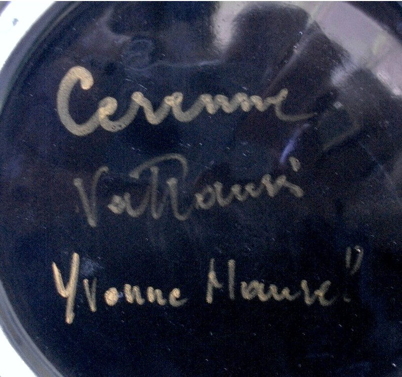 Signature Yvonne Maurel, atelier Cerenne, Vallauris